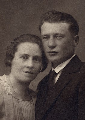 Ilario Margarita (avec sa femme Giuditta Zanella), né le 4 février 1887 à Castelrosso et mort à Turin le 21 octobre 1974, est militant anarchiste et syndicaliste libertaire italien.